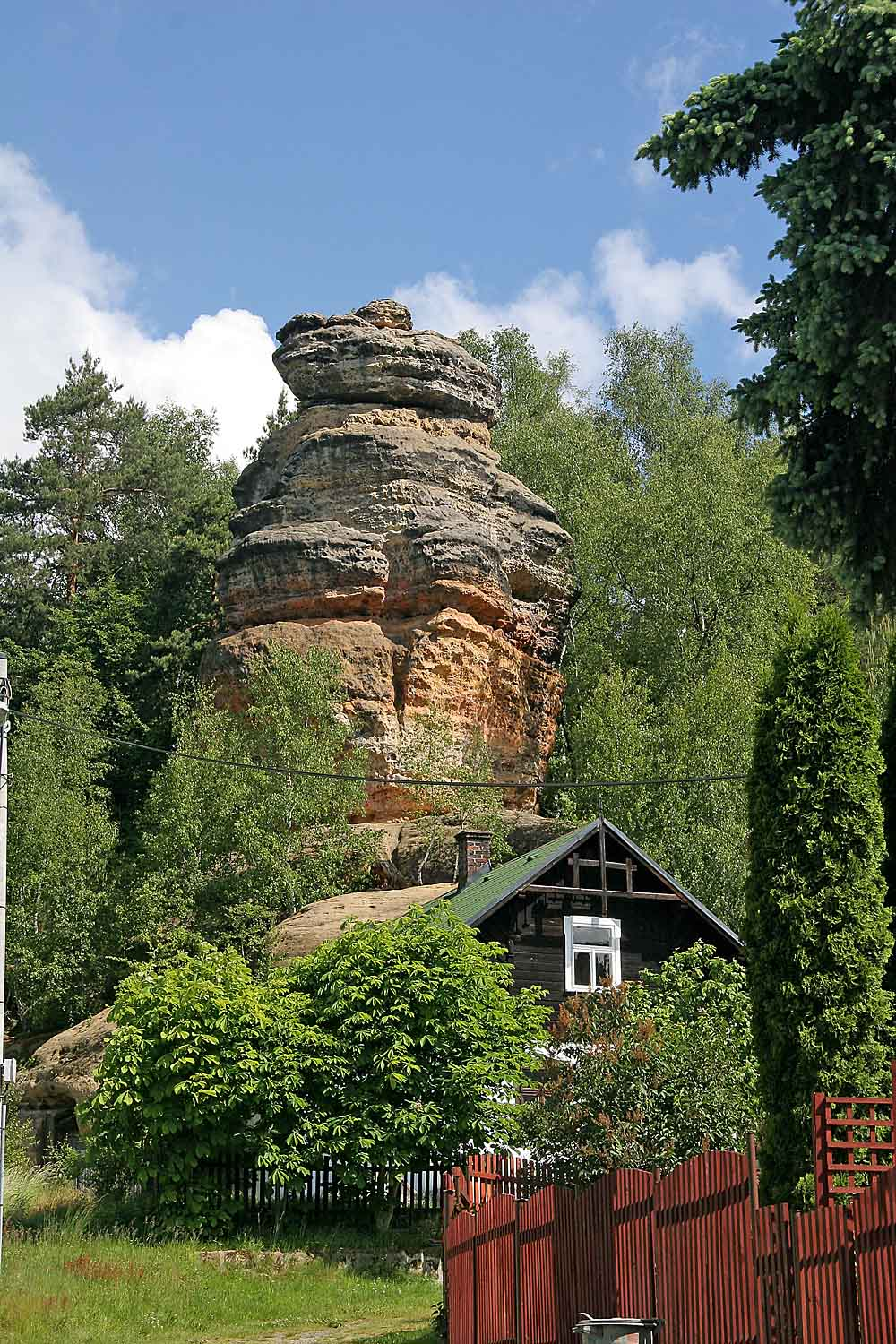 PP Vranovské skály u Mimoně, skalní útvar nad osadou Vranov